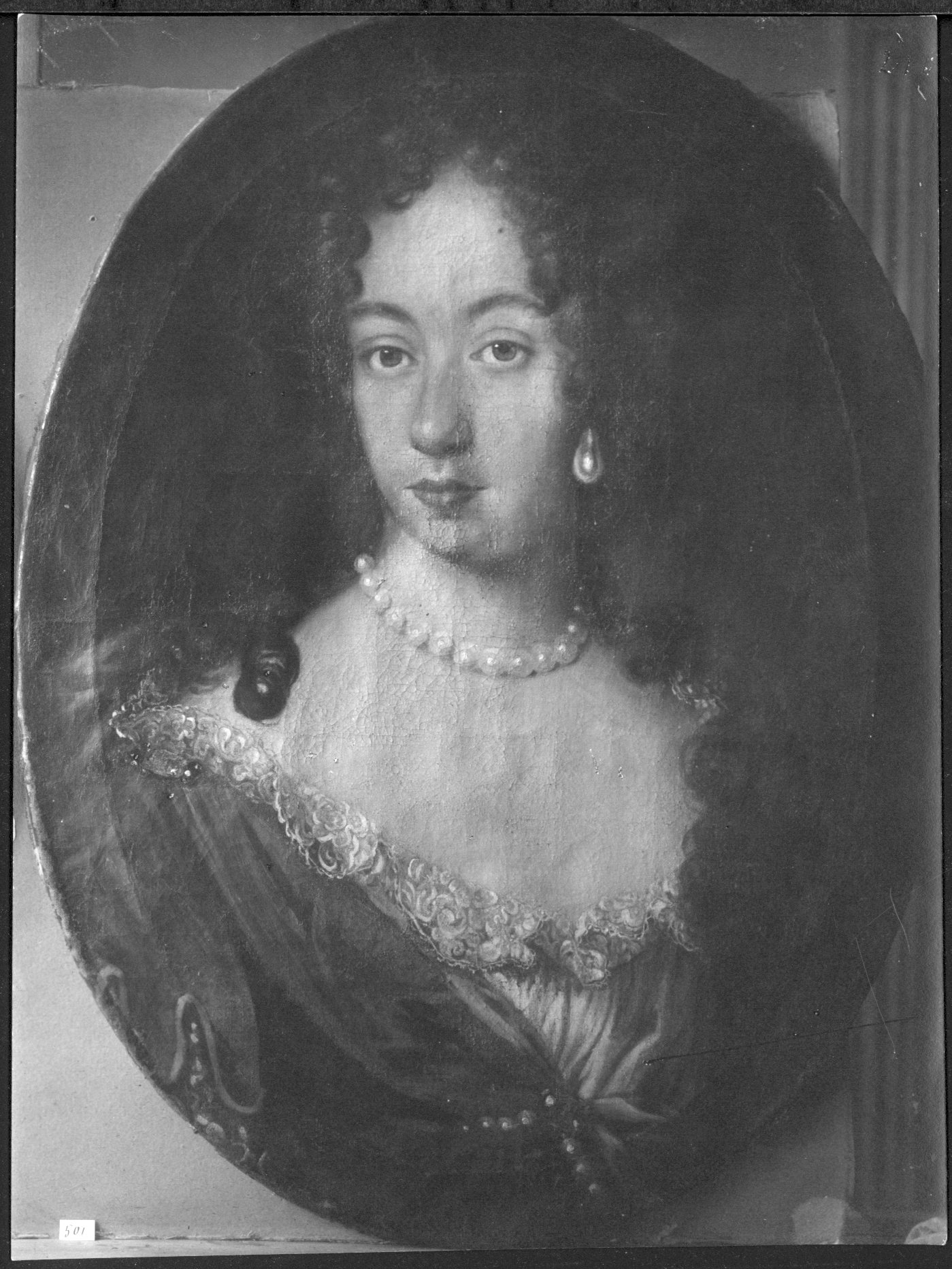 Oljemaleri av Wilhelmina Justina Wedel-Jarlsberg, née komtesse von Aldenburg